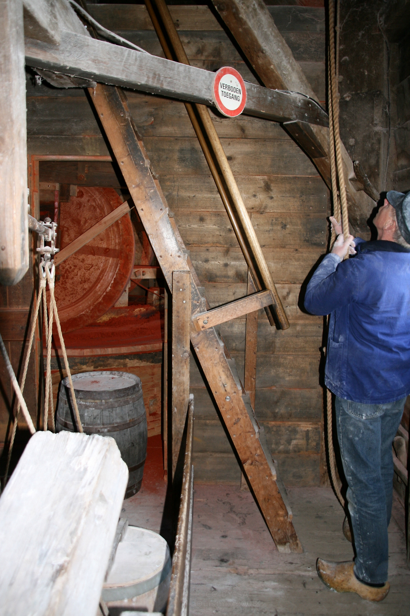 Zaanse Schans: verfmolen De Kat - 2e stel kantstenen met rood pigment